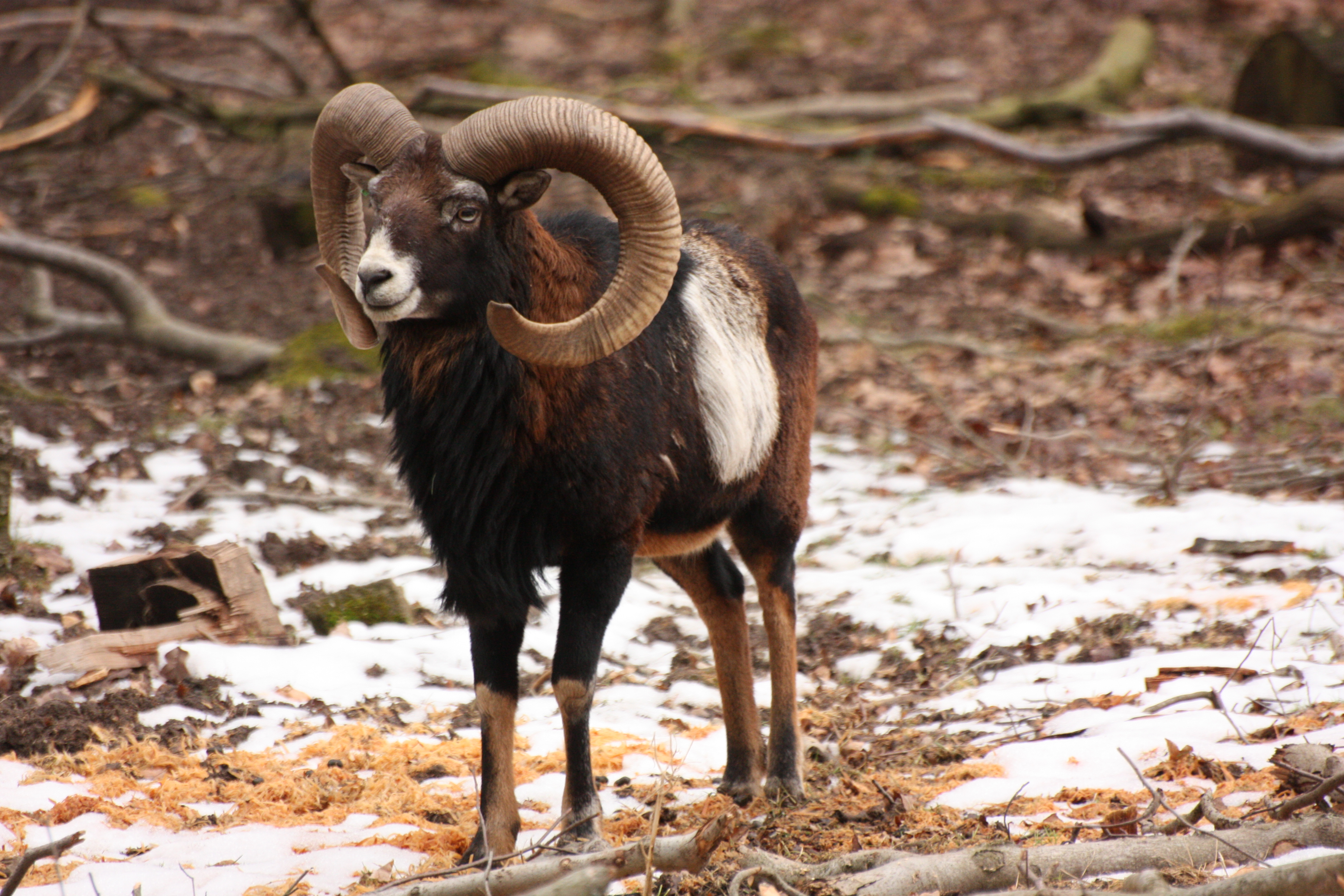 Mufflon (Ovis orientalis orientalis) im Tier- und Pflanzenpark Fasanerie Wiesbaden